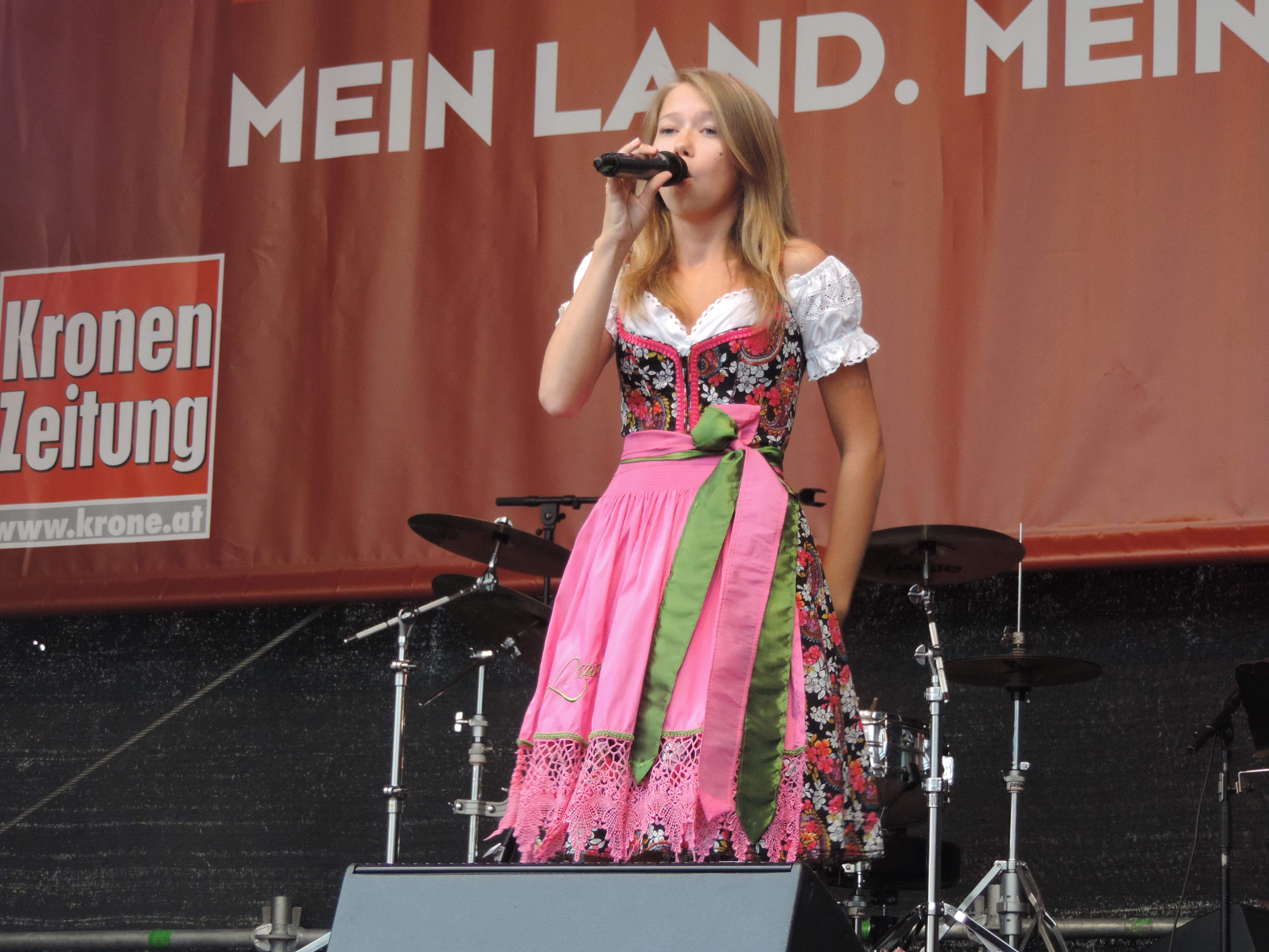 Laura Kamhuber live beim Linzer Kronefest 2015